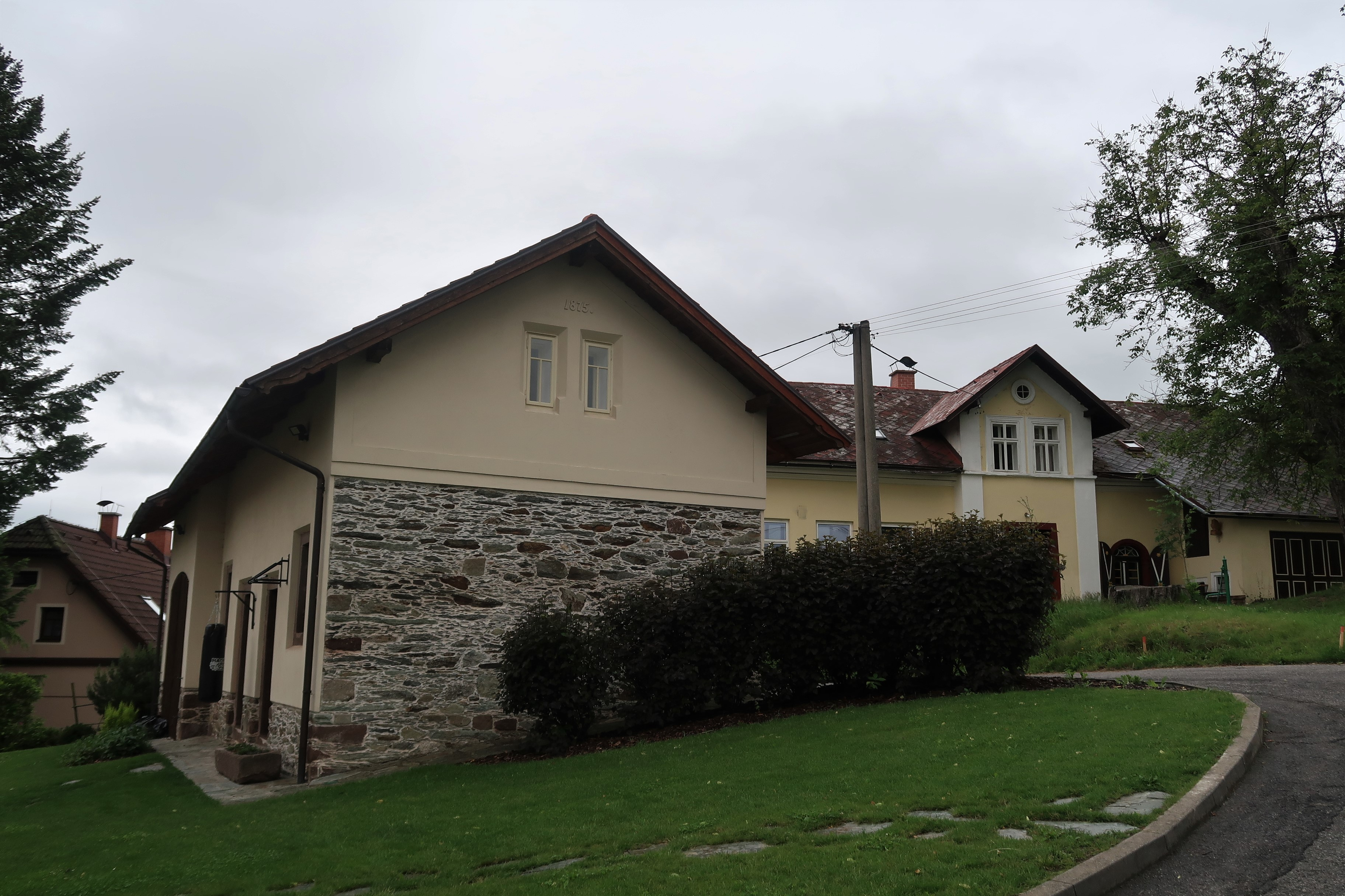 Hospodářská budova u fary (1815)